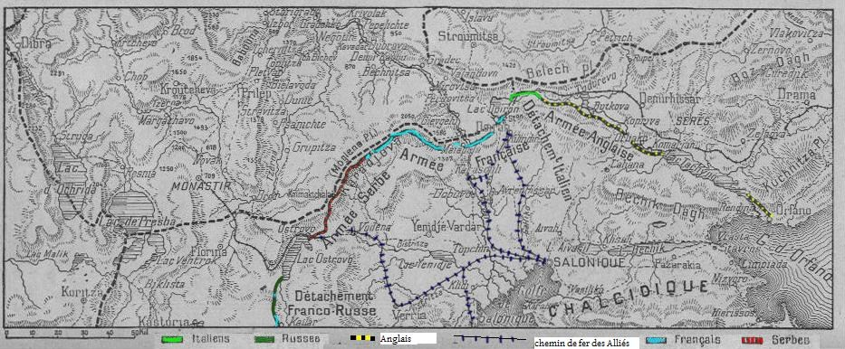 carte_position_des_troupes_par_nationalité en octobre 1916 après l'offensive sur Monastir.